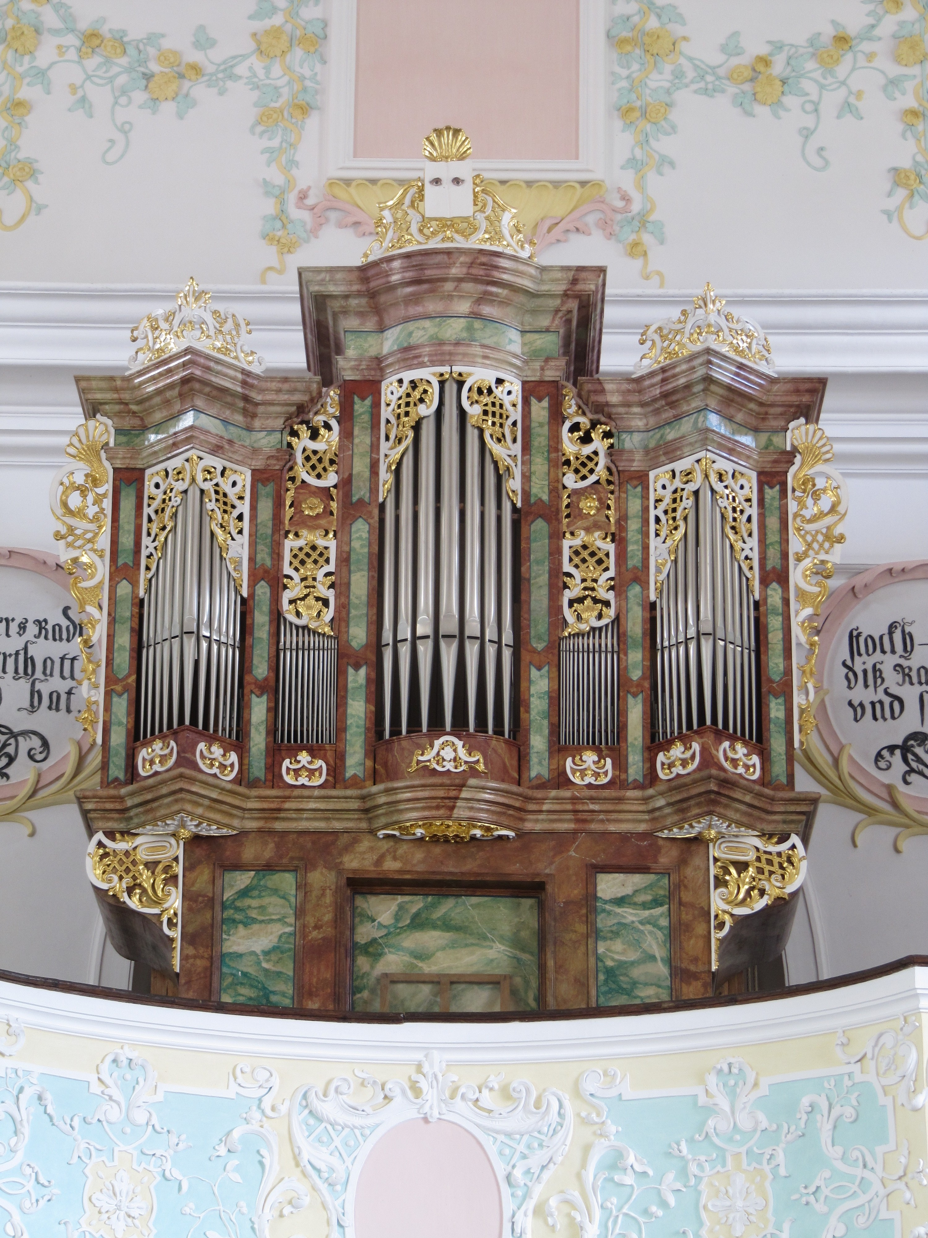 Orgel der Kirche Hellring, erbaut von Brandenstein